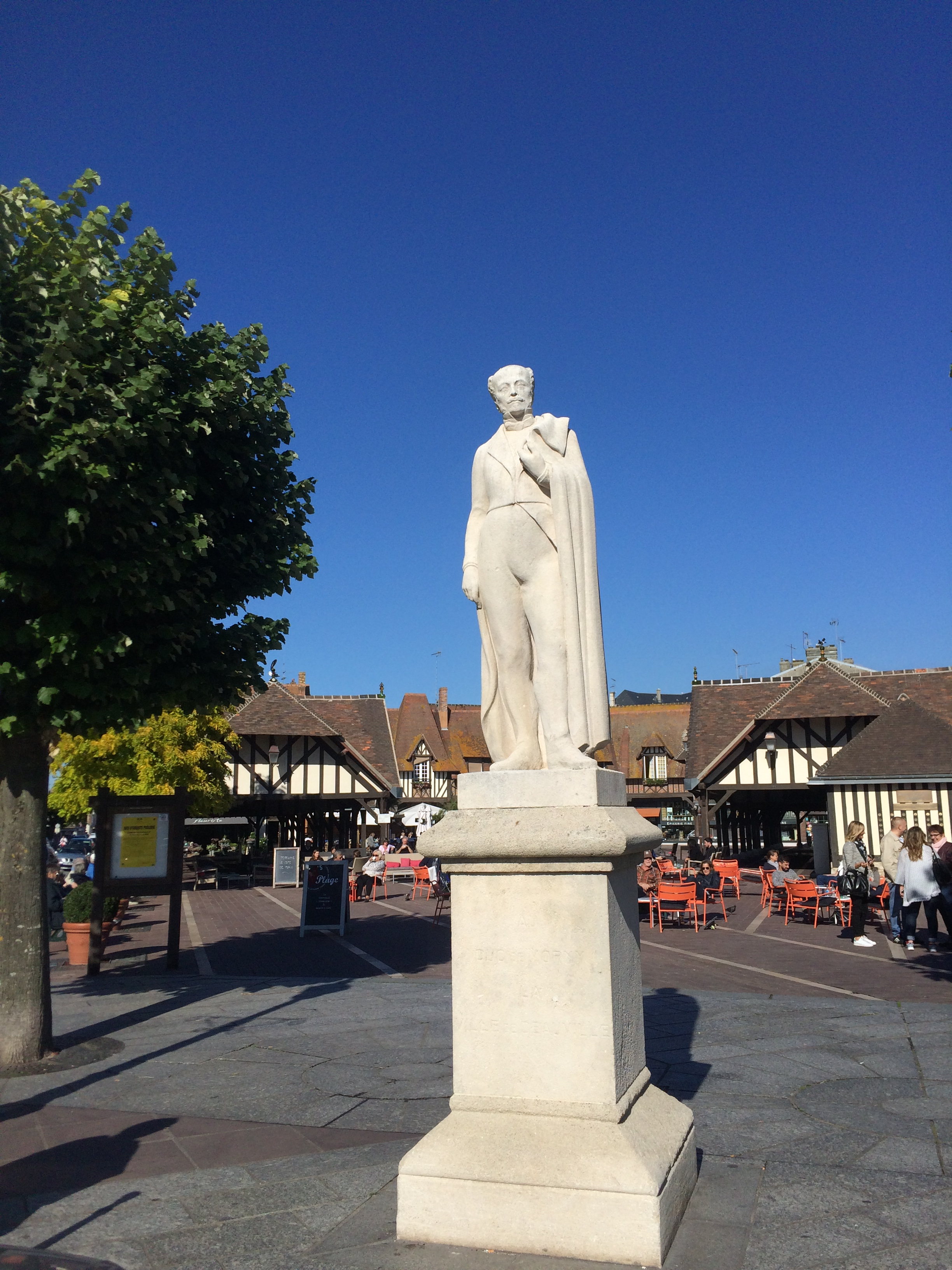 Statue située au centre de la ville de Deauville en honneur à son fondateur.